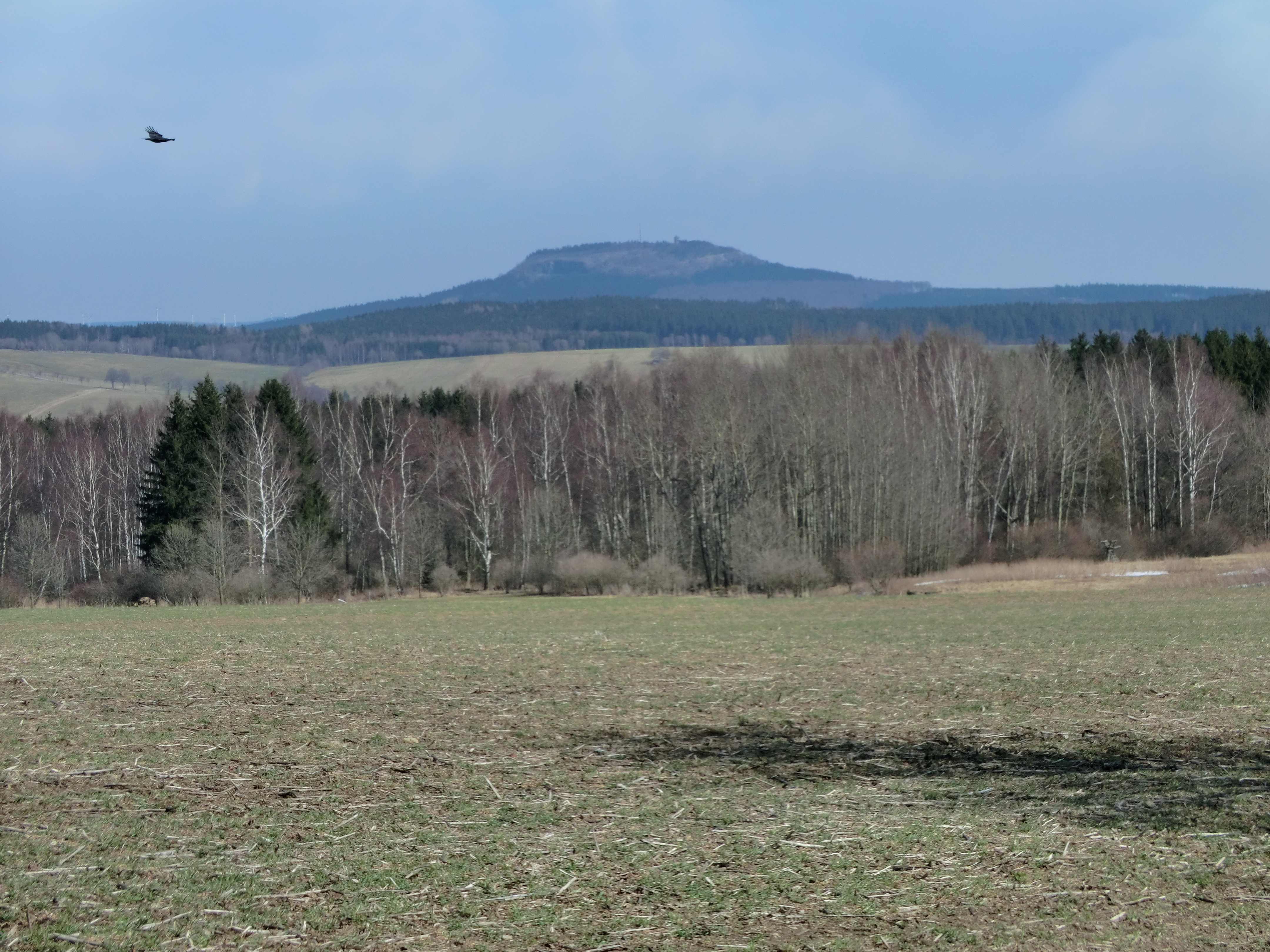 Scheibenberg, Blick von der Straße S268, Landschaftsschutzgebiet c 23